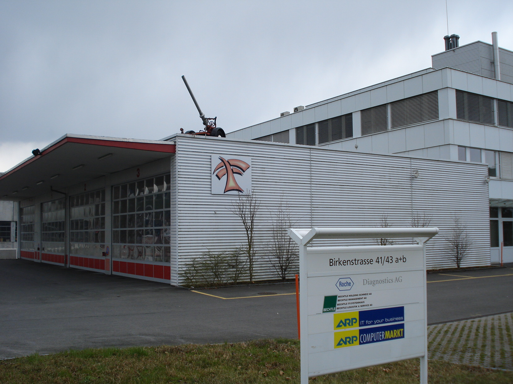 Feuerwehr Risch-Rotkreuz